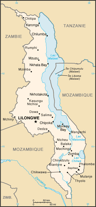 carte Malawi